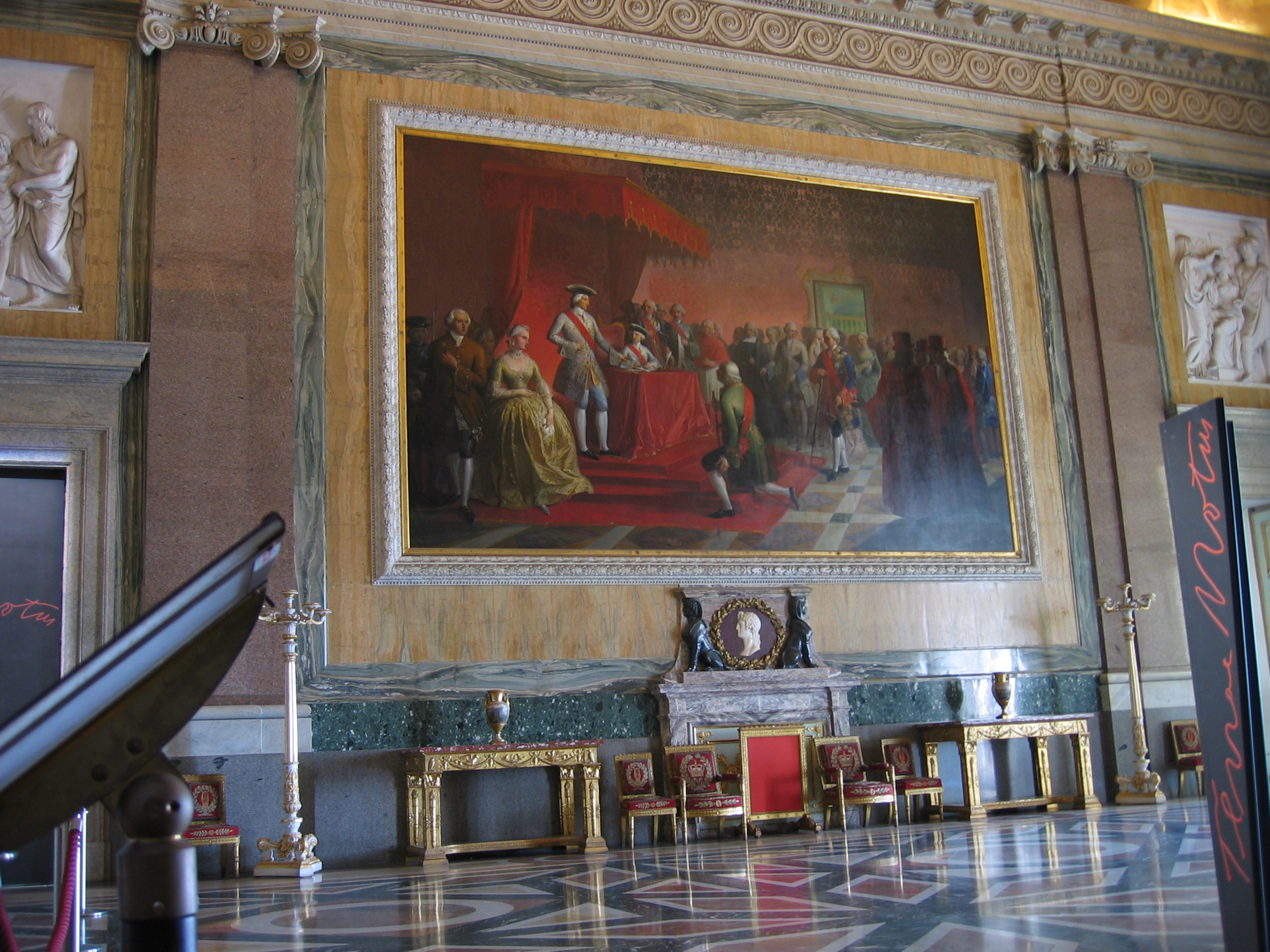 Gemälde im Königspalast von Caserta